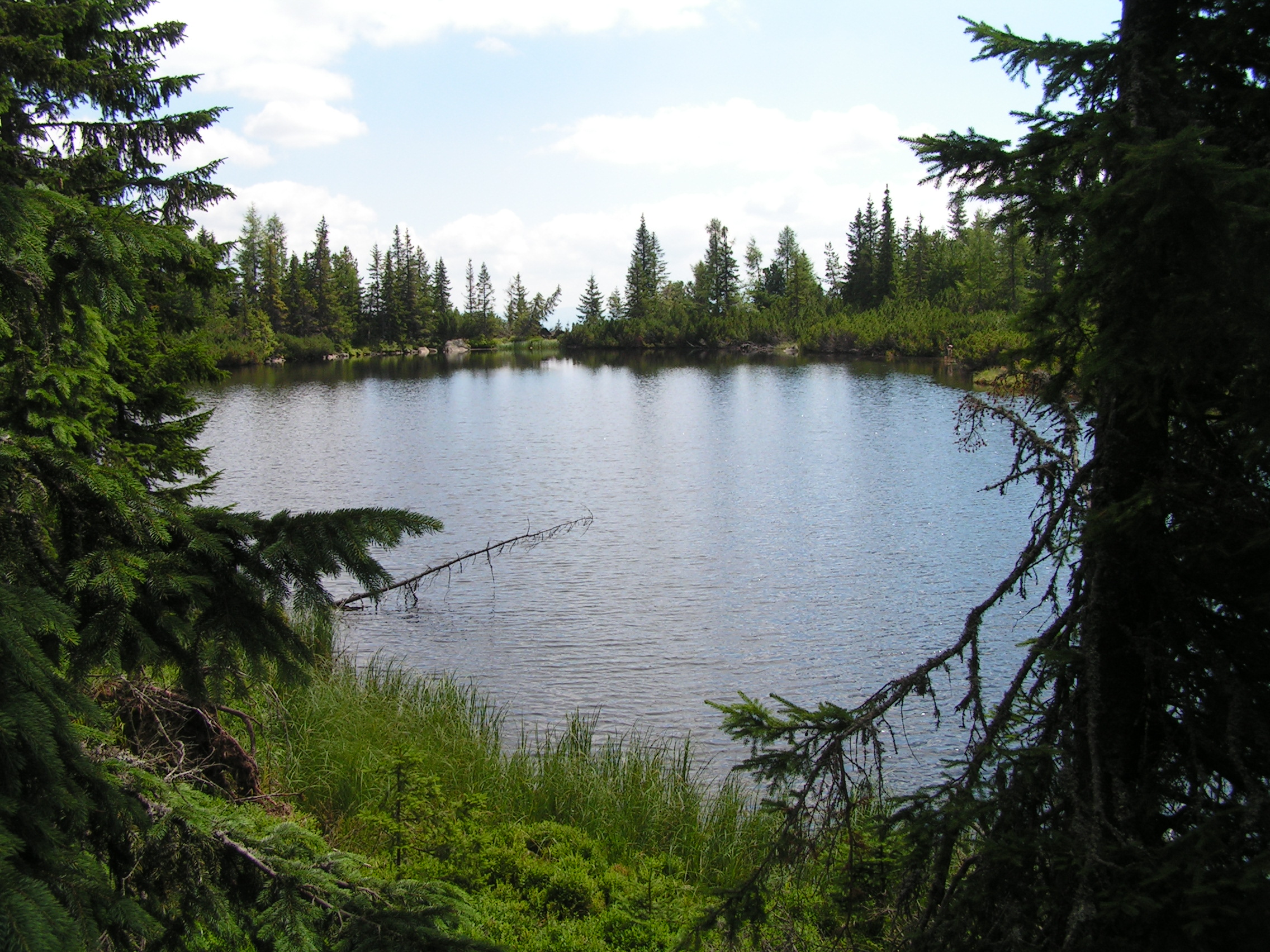 Česky: Jamské pleso